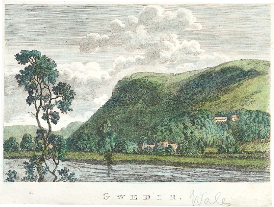 View of Gwydir Castle and Afon Conwy.